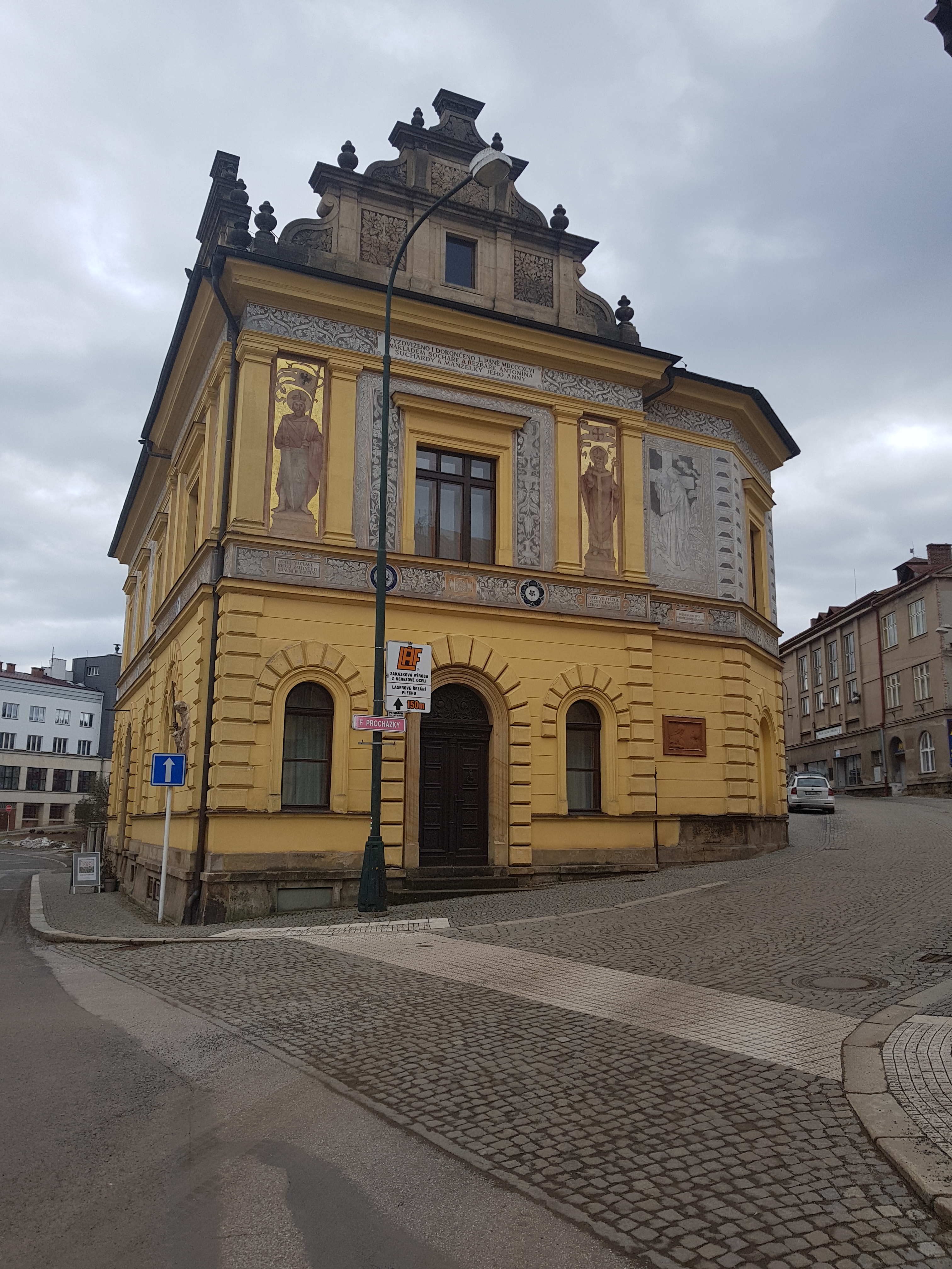 Suchardův dům